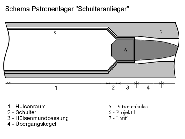 Schemazeichnung Patronenlager Schulteranlieger